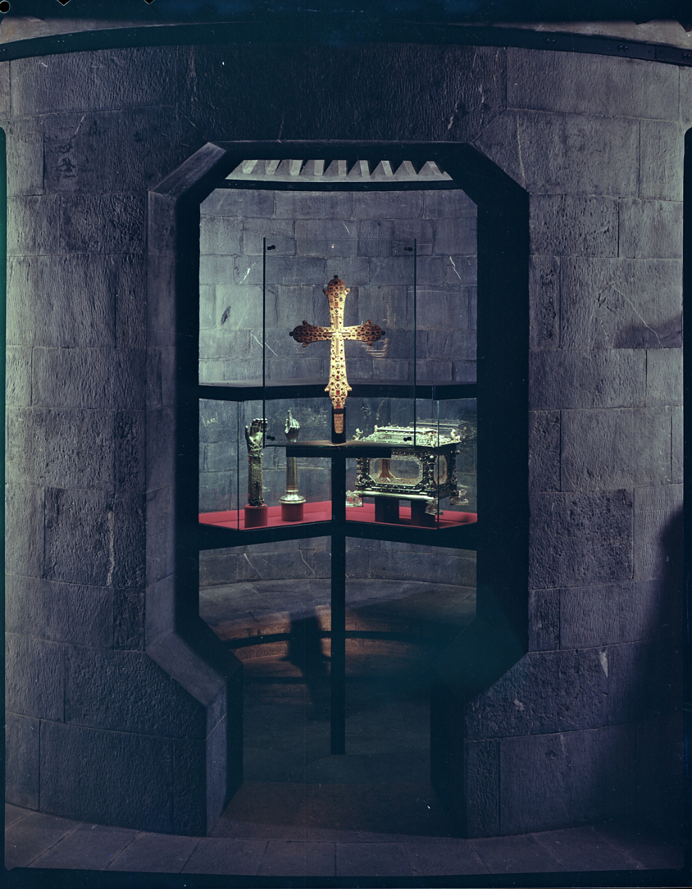 Servizio fotografico : Genova, 1963 / Paolo Monti. - Buste: 2, Fototipi: 2 : Negativo colore, sviluppo cromogeno/ pellicola ; 10x12. - ((Serie costituita da 2 negativi identificati con i nn.: 1203-1204. La suddetta serie è contenuta nella scatola identificata con la numerazione GC1175N/GC1272N. Sul coperchio della scatola manoscritto: "Colore/ N."